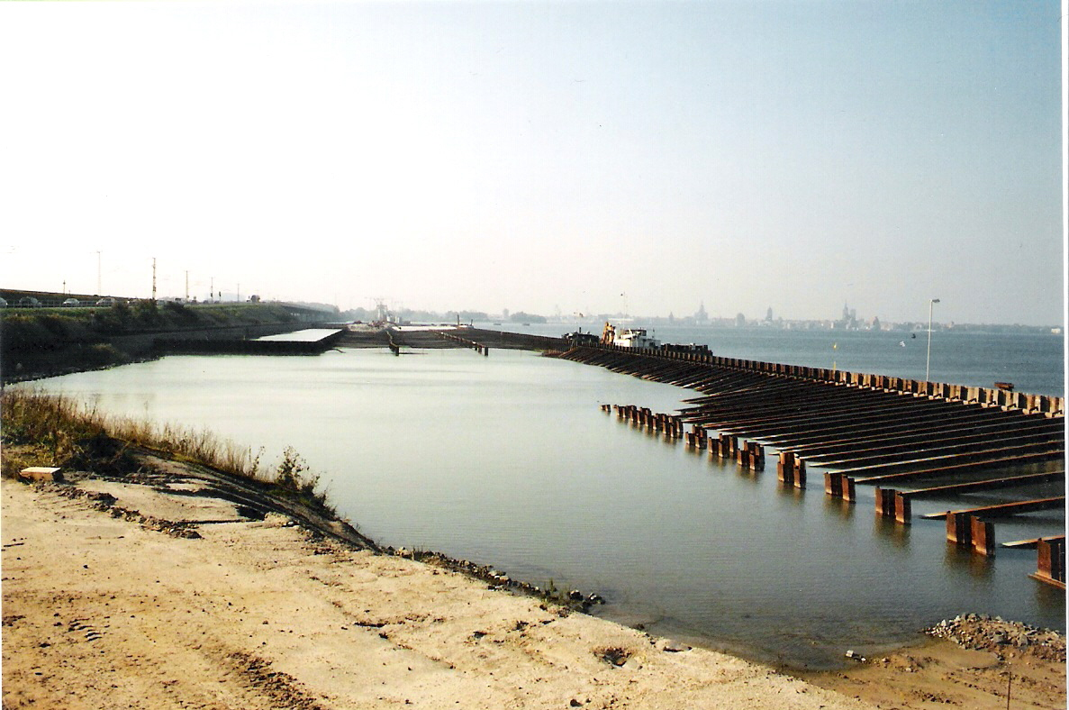 Autor: Benutzer:Klugschnacker, selbst fotografiert. Neue Rügenbrücke in Stralsund, Aufspülung am Damm nahe Altefähr, im Hintergrund Stralsunds Silhouette, Oktober 2005